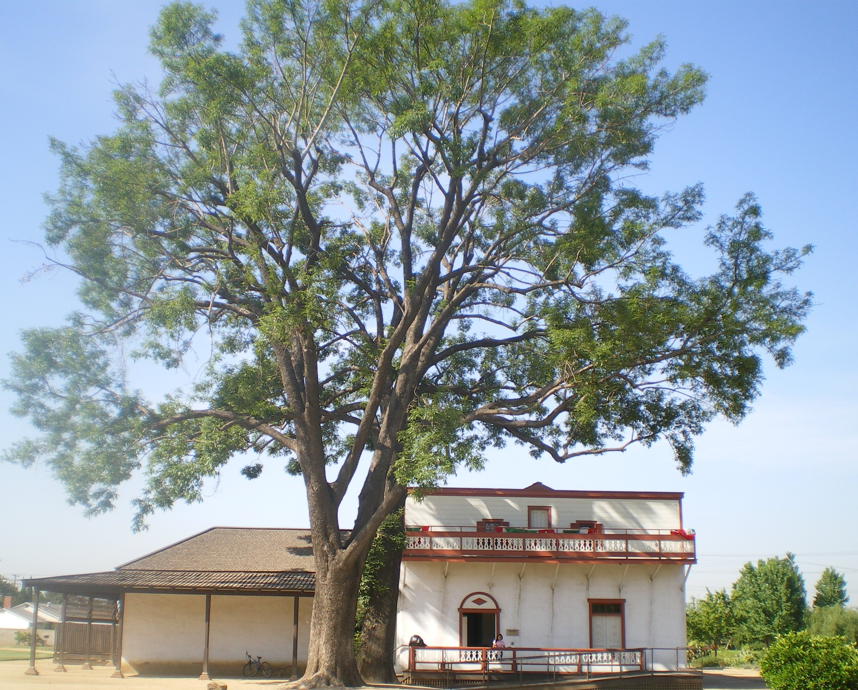 Pio Pico Casa, Whittier, California